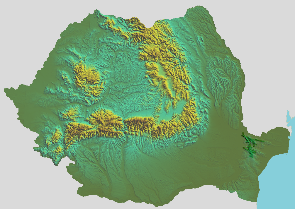 Dobrudja Mountains